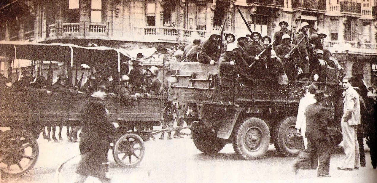 Levantamiento de 1943